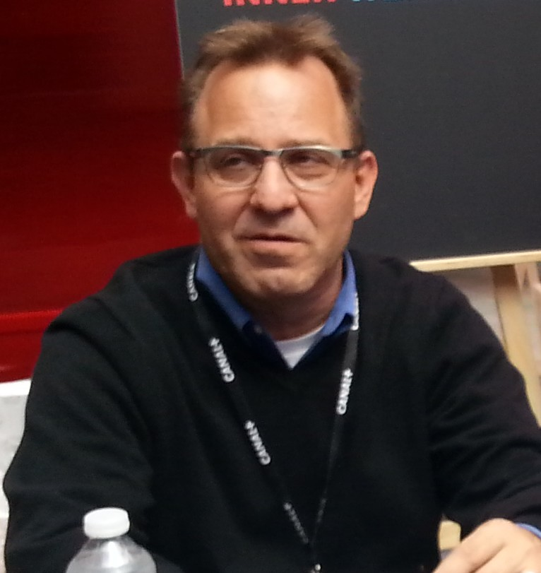 Sean Lurie au festival international du film d'animation d'Annecy 2016